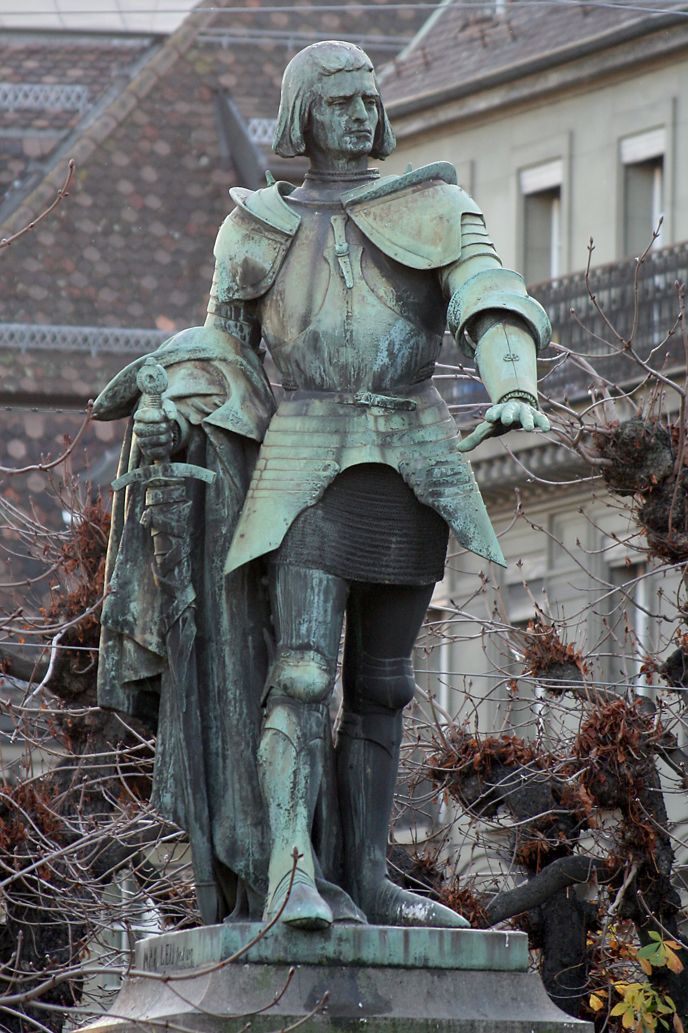 Statue von Adrian von Bubenberg, Hirschengraben, Bern, Schweiz